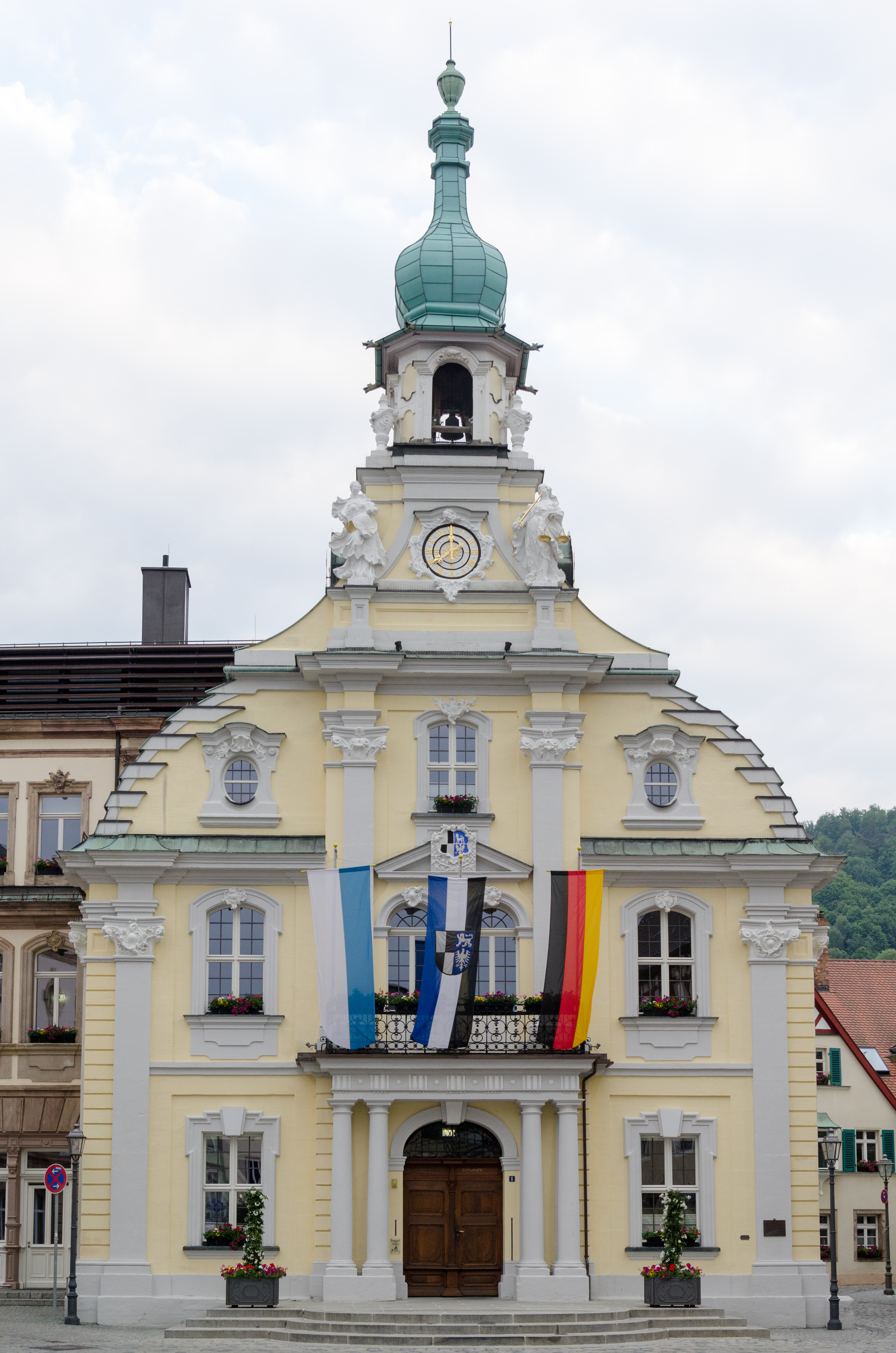 Kulmbach, Rathaus